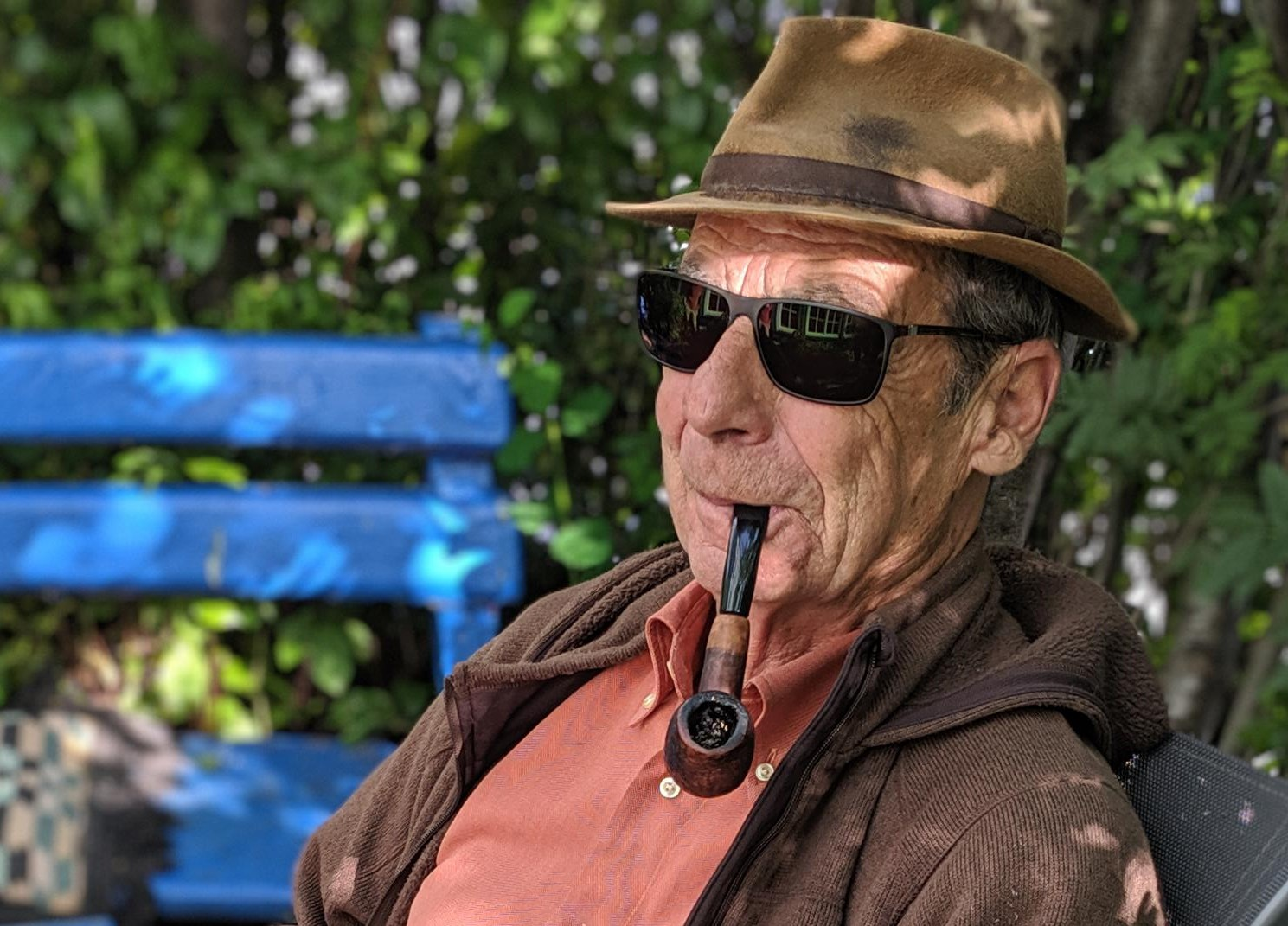 Conradin Perner in seinem Zuhause in Davos.